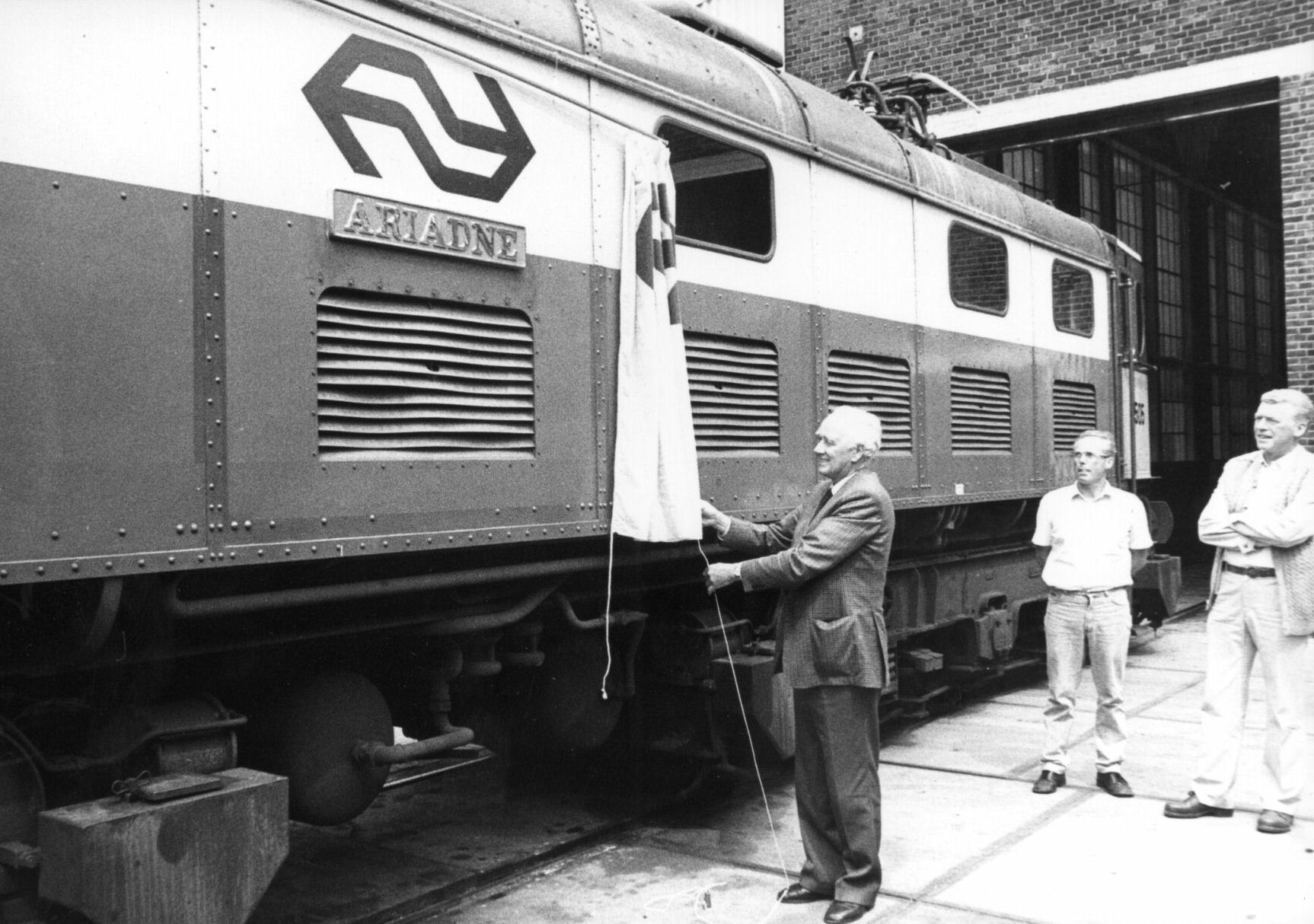 Afbeelding van de onthulling van de naamplaat "Ariadne" op de electrische locomotief nr. 1505 (serie 1500) van de N.S. door ir. Chr. Moolhuijzen (Chef van Dienst van Materieel en Werkplaatsen) bij de hoofdwerkplaats van de N.S. te Tilburg.